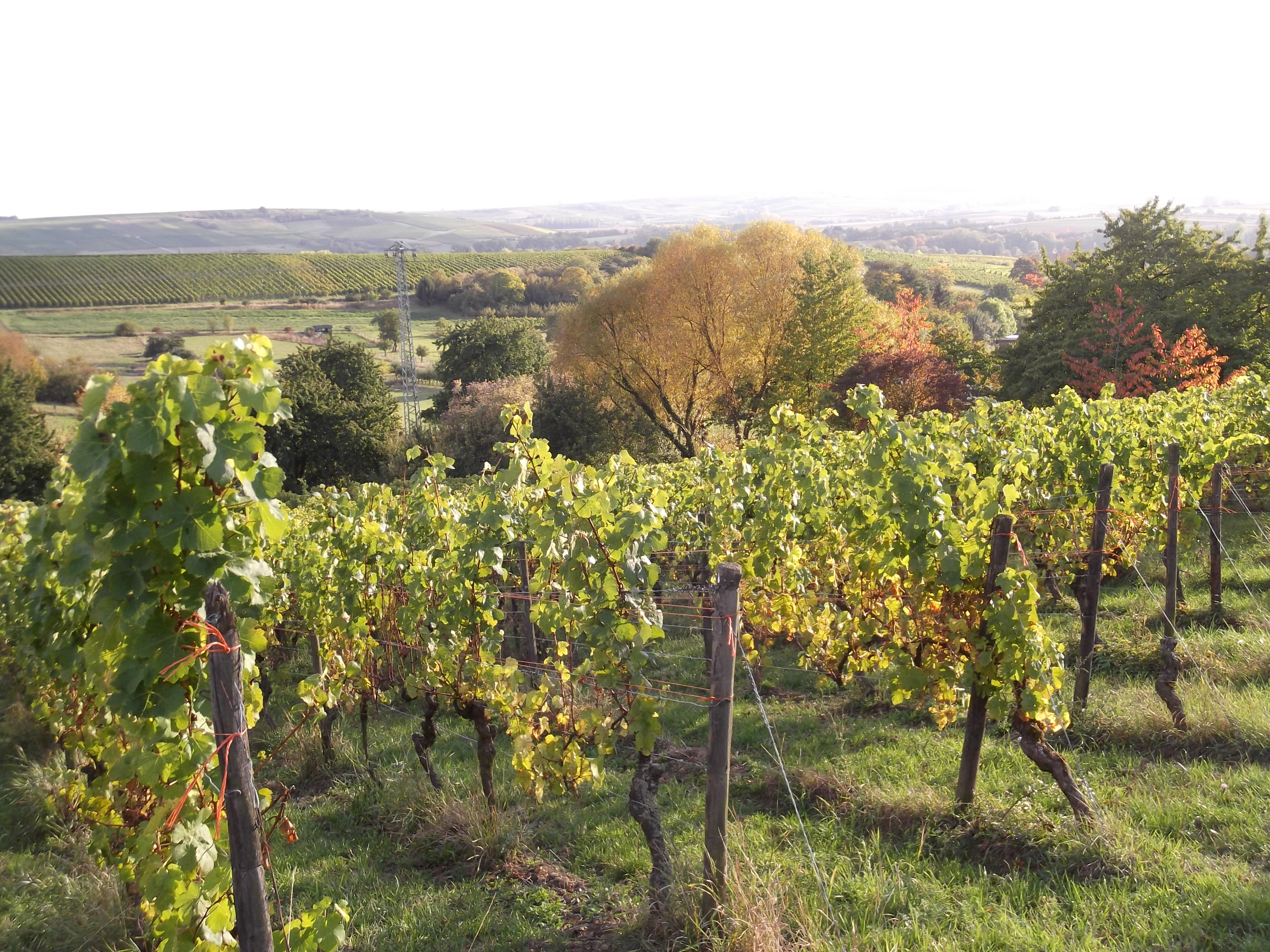 Weinberge in den rheinhessischen Hügeln bei Stadecken-Elsheim